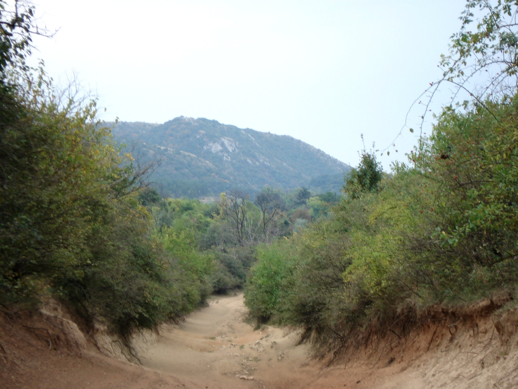 Túristaút a Baglyas hegyre Bakonykúti felől